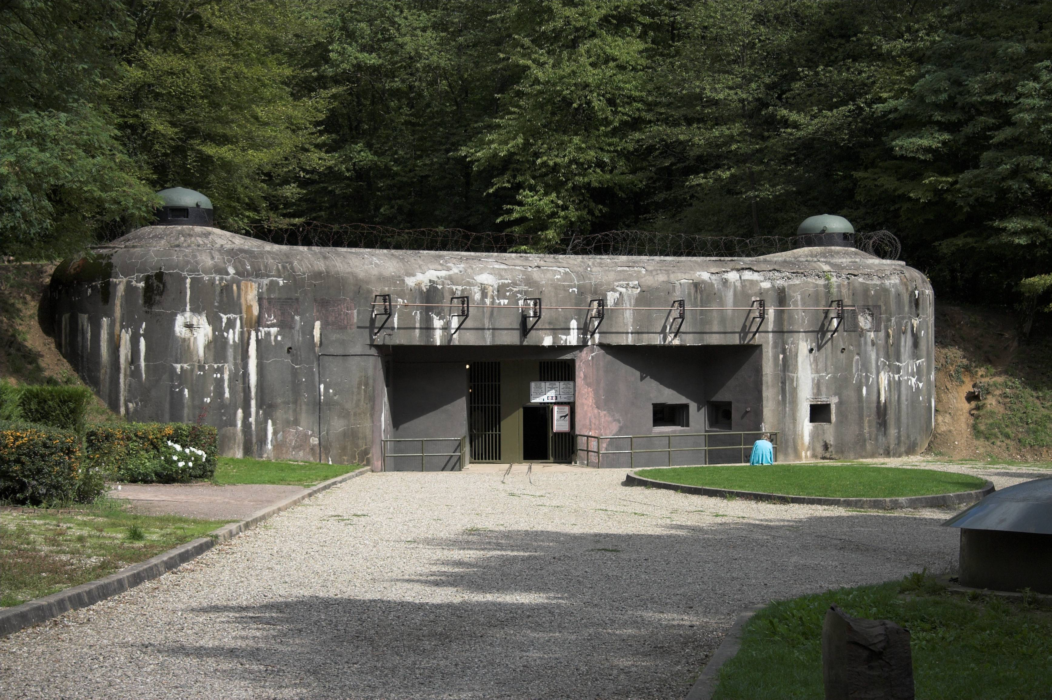 Fort Shoenenbourg(Schoenenbourg, France)